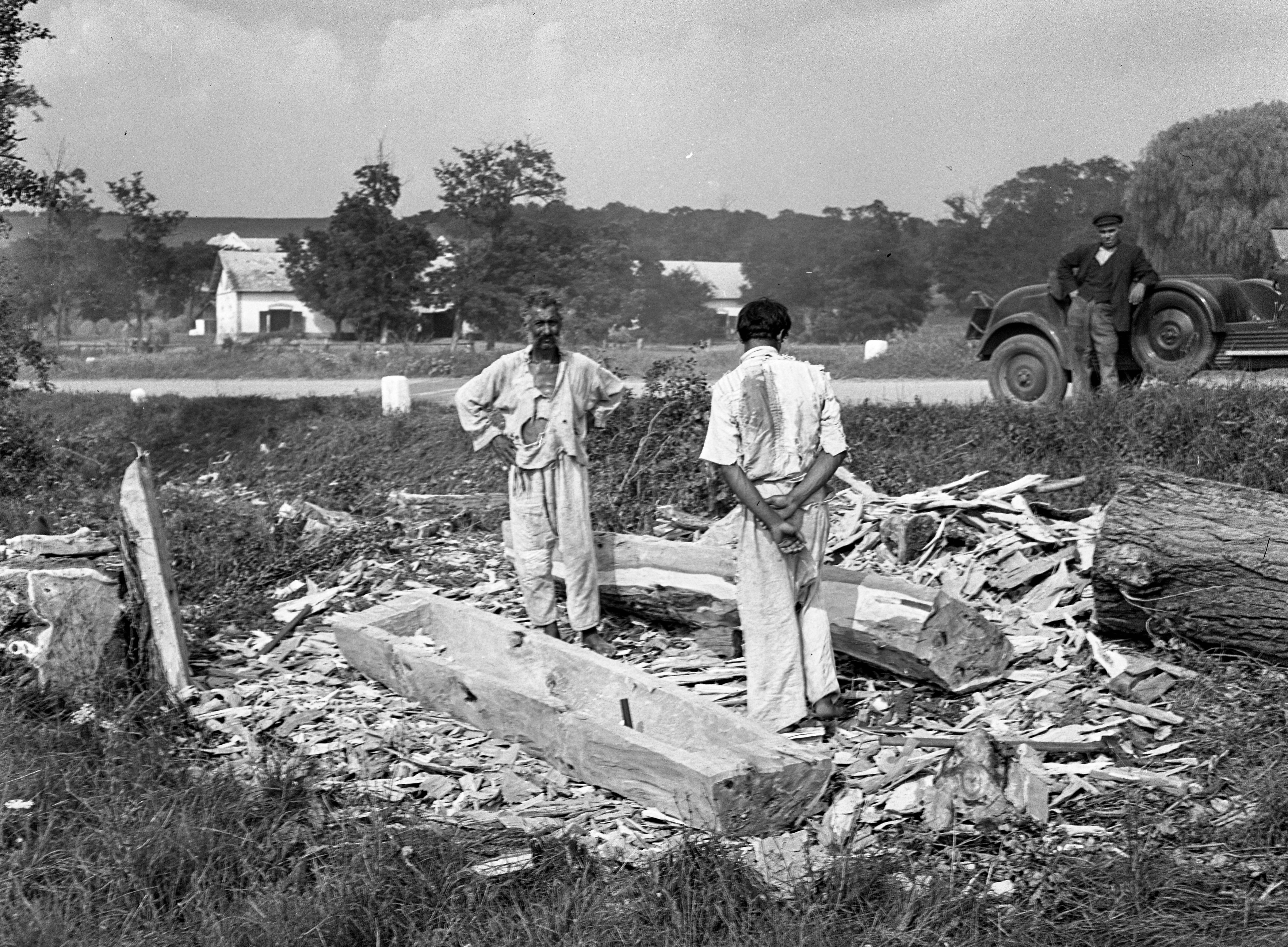 Teknővájó cigányok. A háttérben Tempo G 1200 típusú személygépkocsi. Location: Hungary Tags: gypsy, tub, trunk, automobile Title: Teknővájó cigányok. A háttérben Tempo G 1200 típusú személygépkocsi.